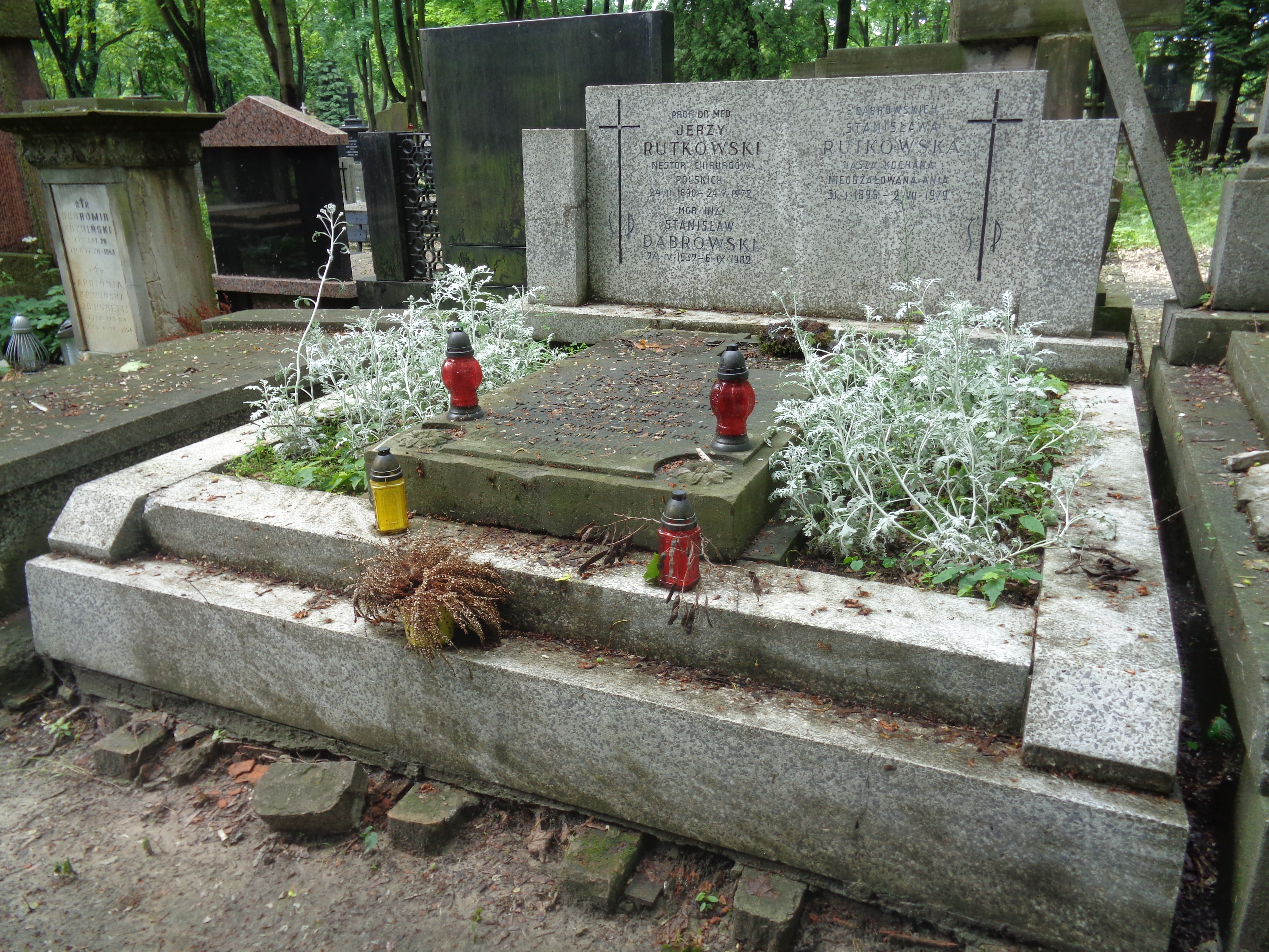 Grób lekarza Jerzego Rutkowskiego na Cmentarzu Powązkowskim